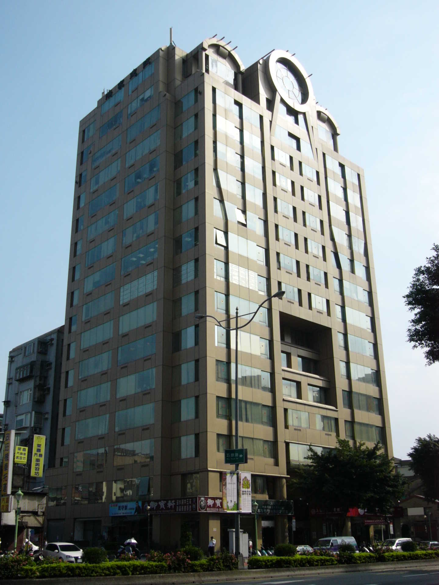 首府經貿大廈，位於臺灣臺北市大同區承德路二段，東立出版社總部設於81號10樓。